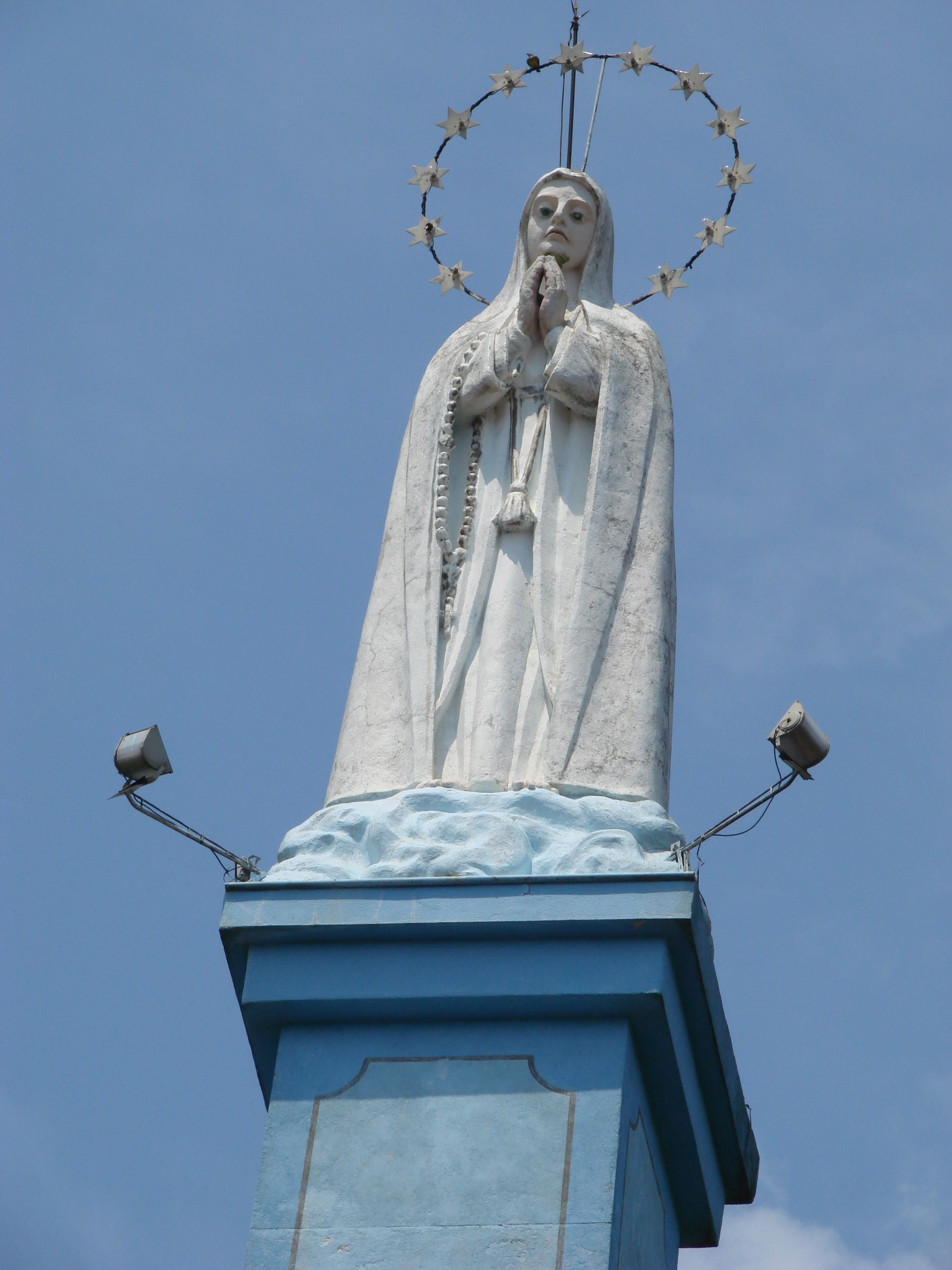 Imagem de Nossa Senhora de Fátima